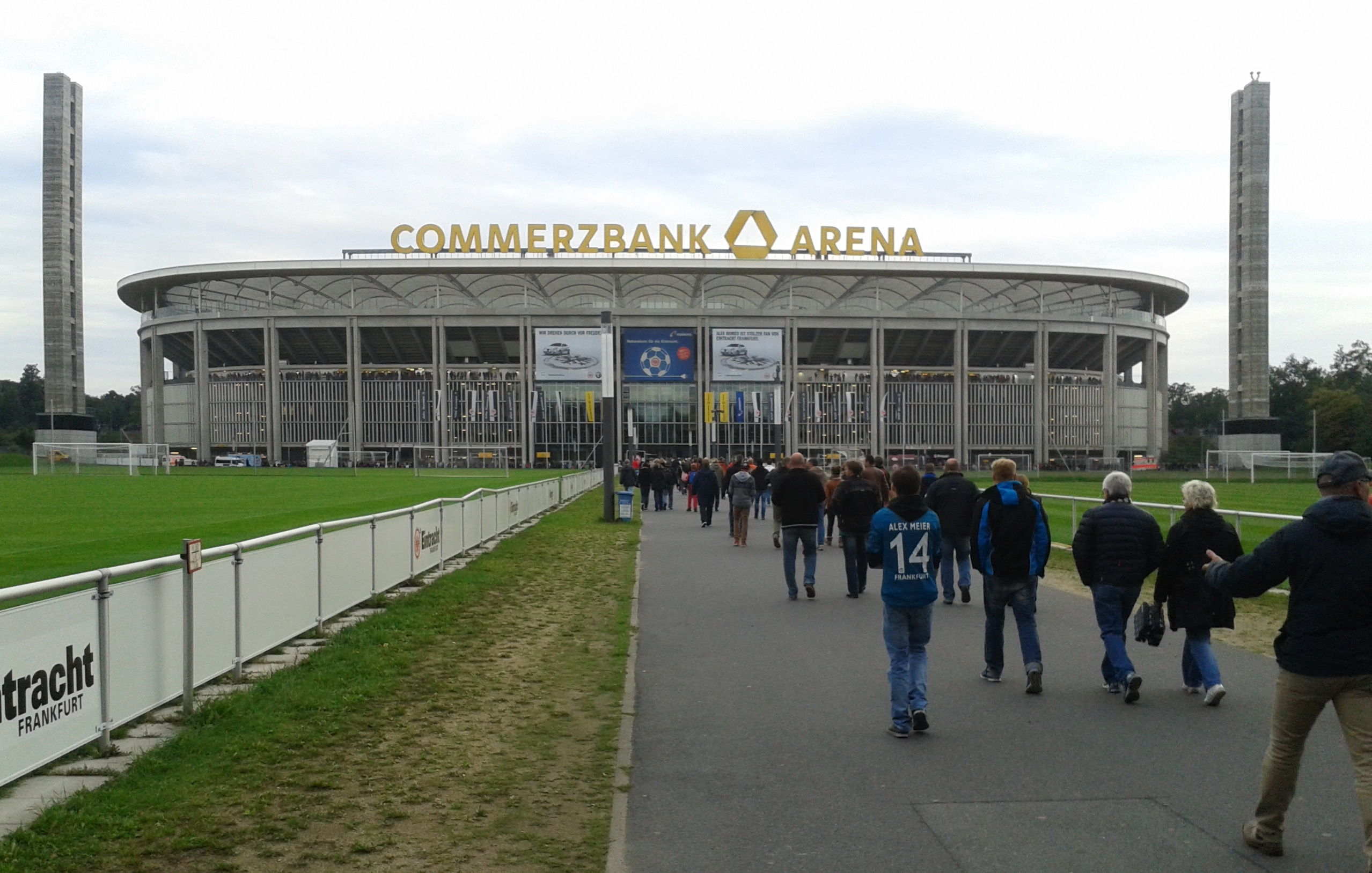 Frankfurt am Main, Waldstadion/Commerzbank-Arena, Germany, Eintracht Frankfurt-Girondins Bordeaux Endstand 3:0 für die Eintracht (erstes Heimspiel in der UEFA-Europa-League in der Saision 2013/2014); Außenansicht der Commerzbank-Arena, Blick auf die Haupttribüne